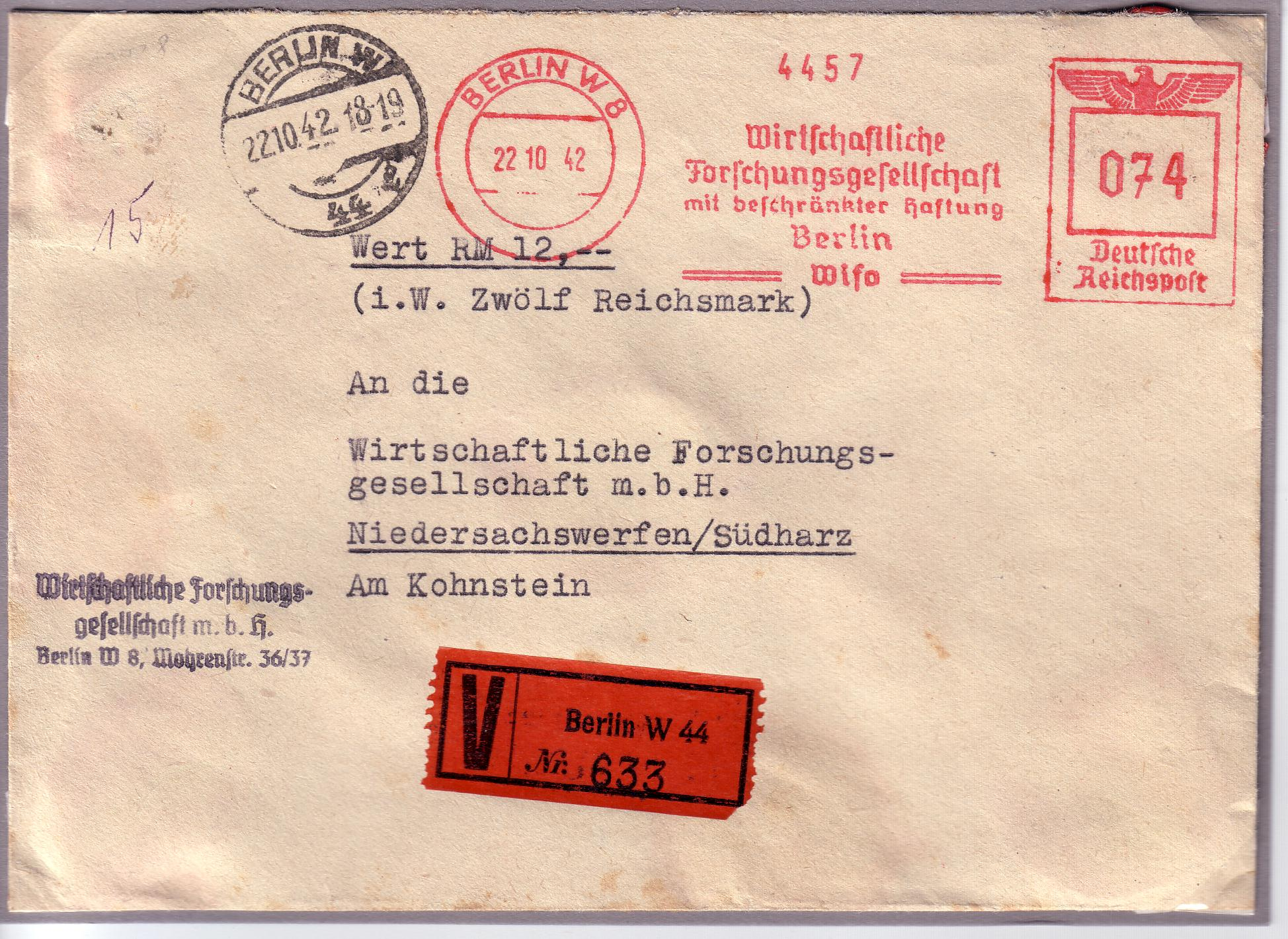 Wertbrief mit Absenderfreistempler der Wirtschaftlichen Forschungsgesellschaft - Wifo von 1942 Freistempler: "Wirtschaftliche Forschungsgesellschaft mit beschränkter Haftung Berlin-Wifo / Berlin W 8" Poststempel: Berlin W 44